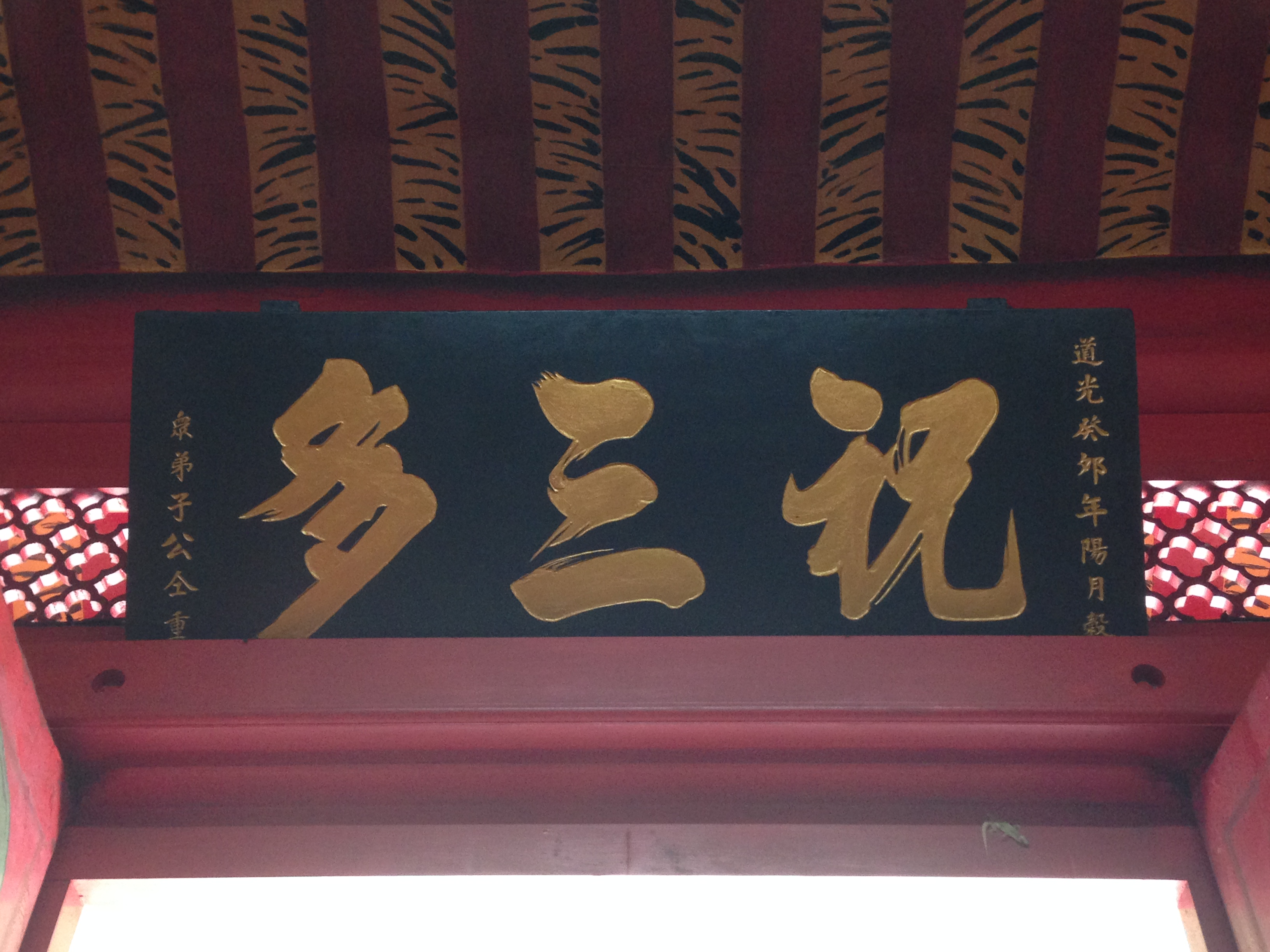 中文（台灣）: 祝三多廟匾額